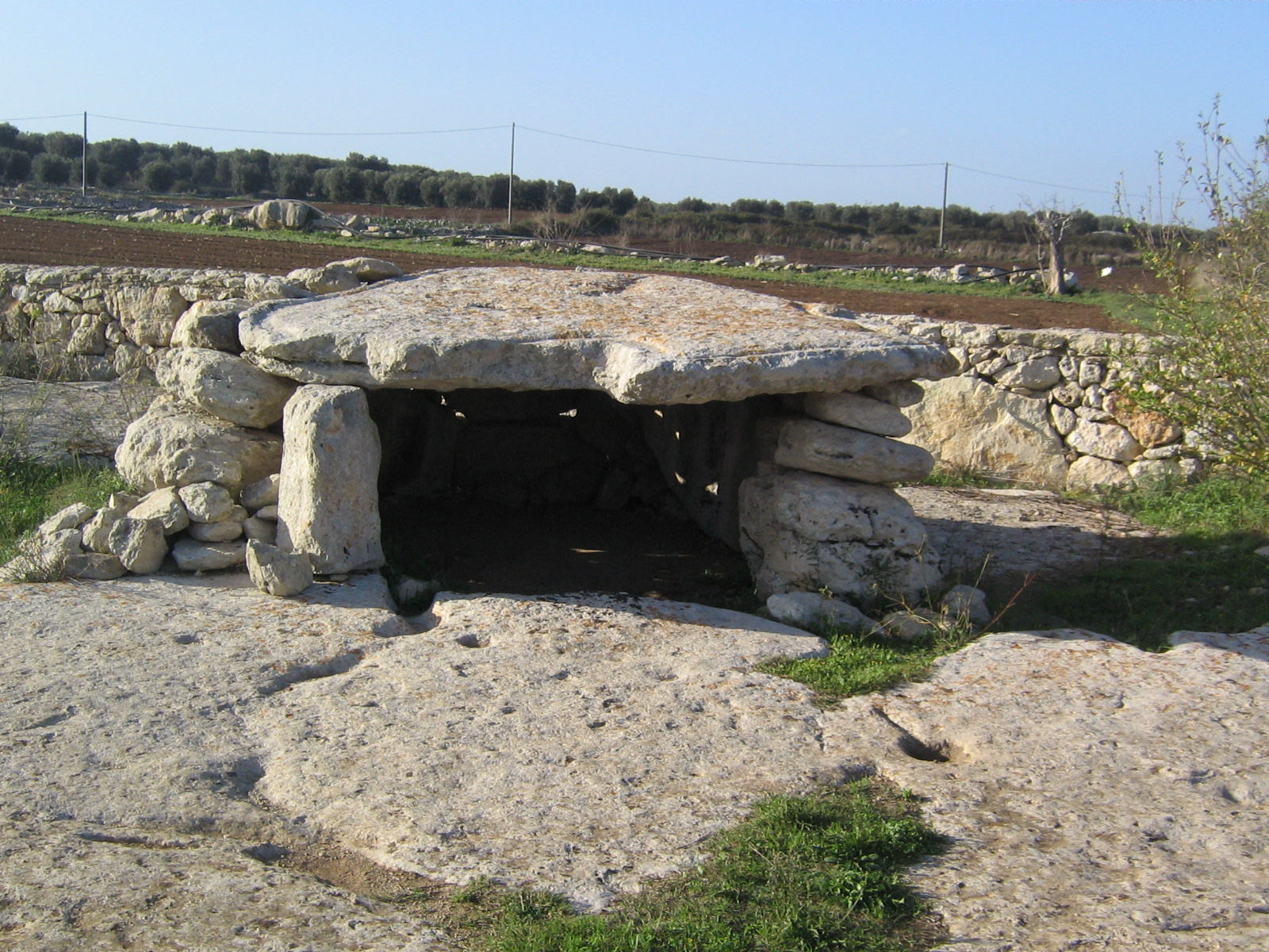 Categoria:Immagini esclusivamente in GNU FDL